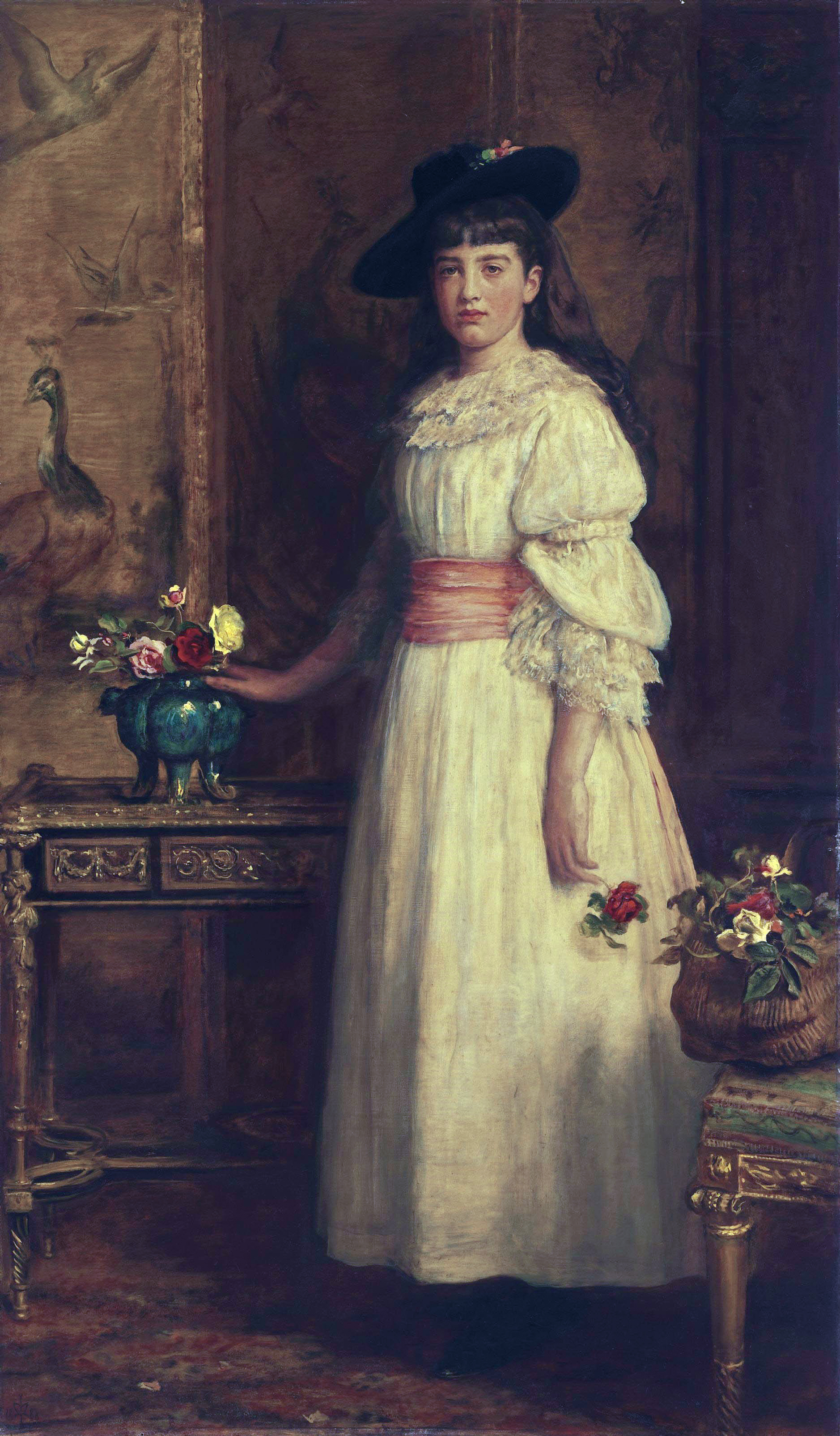 Portrait of Gertrude Vanderbilt Whitney